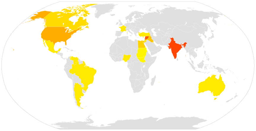 Países con jurisdicciones católicas de tradición litúrgica antioquena